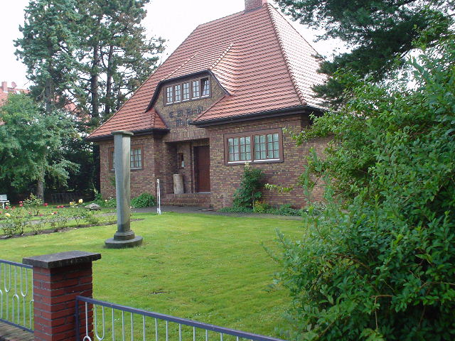 Ernst-Moritz-Arndt-Museum in Garz, Rügen, Germany, built 1937